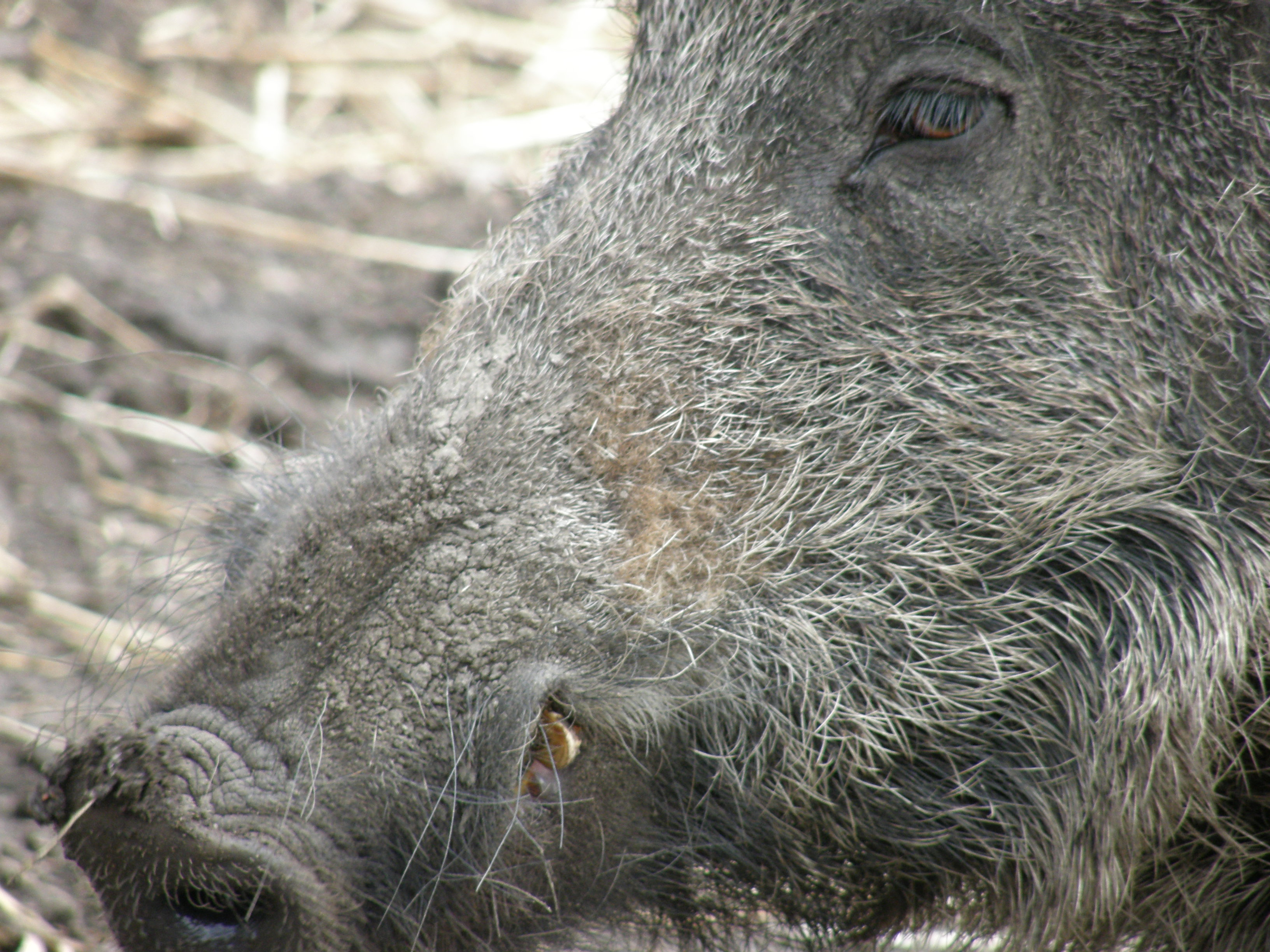 Wildschwein, Wild boar, wood near Kiel